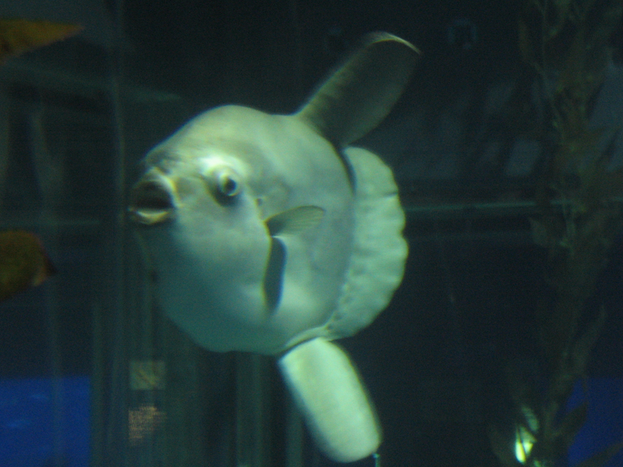 Mola mola Ocean Sunfish at Osaka Kaiyukan Aquarium (Personal picture taken on November 4, 2006)